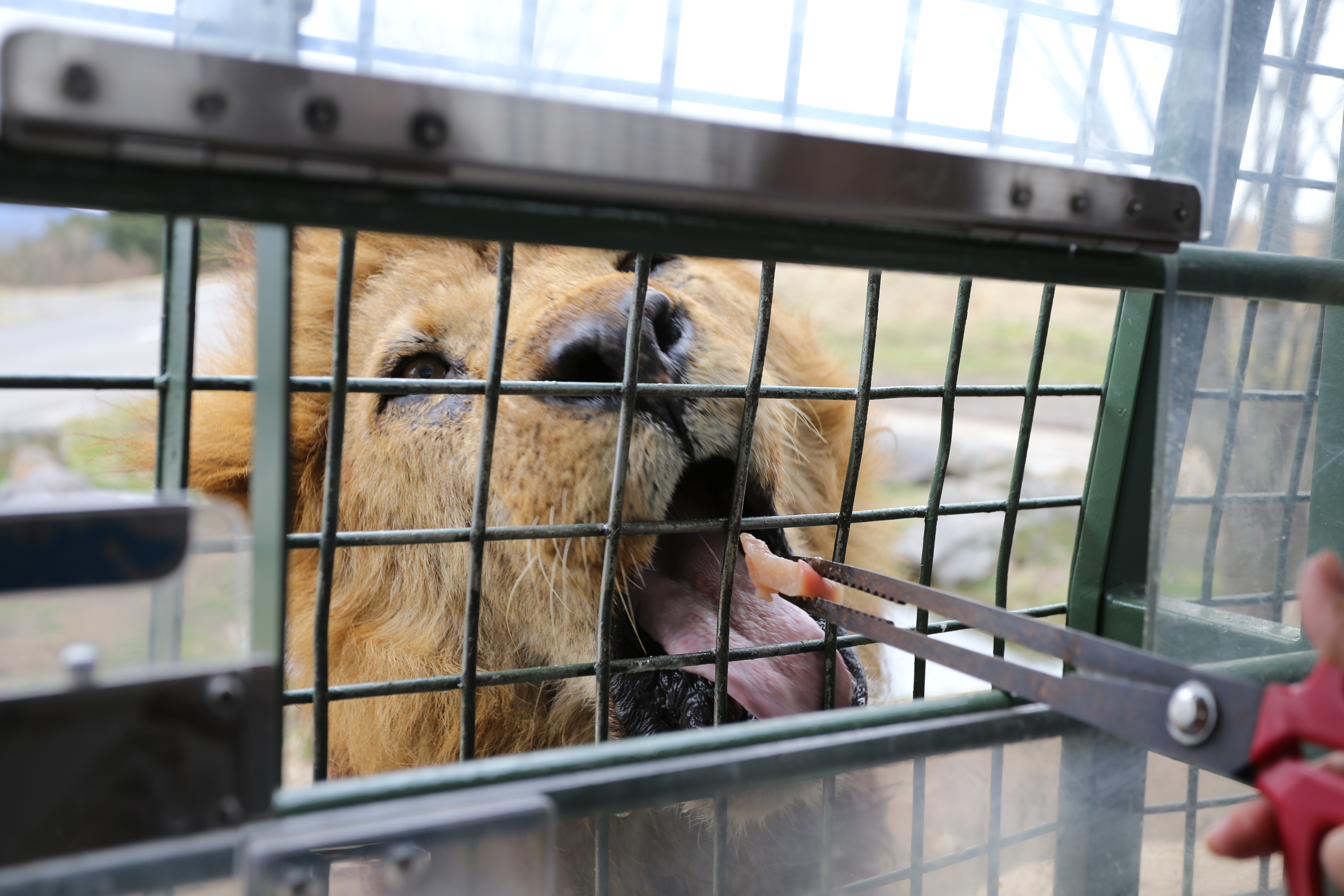 アフリカンサファリ African Safari 九州自然動物園